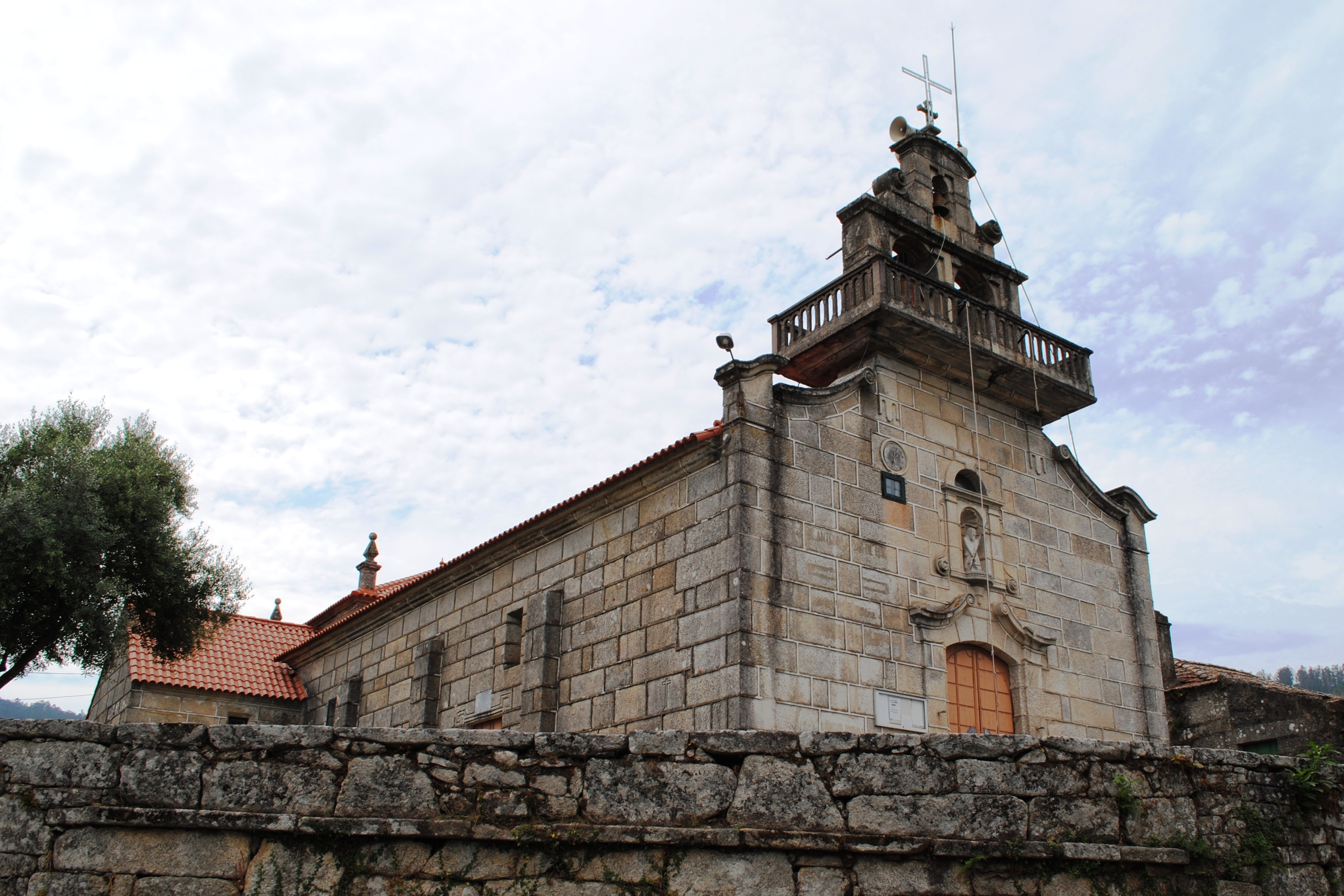 O Porriño, S. Xoán Bautista de Chenlo, igrexa.